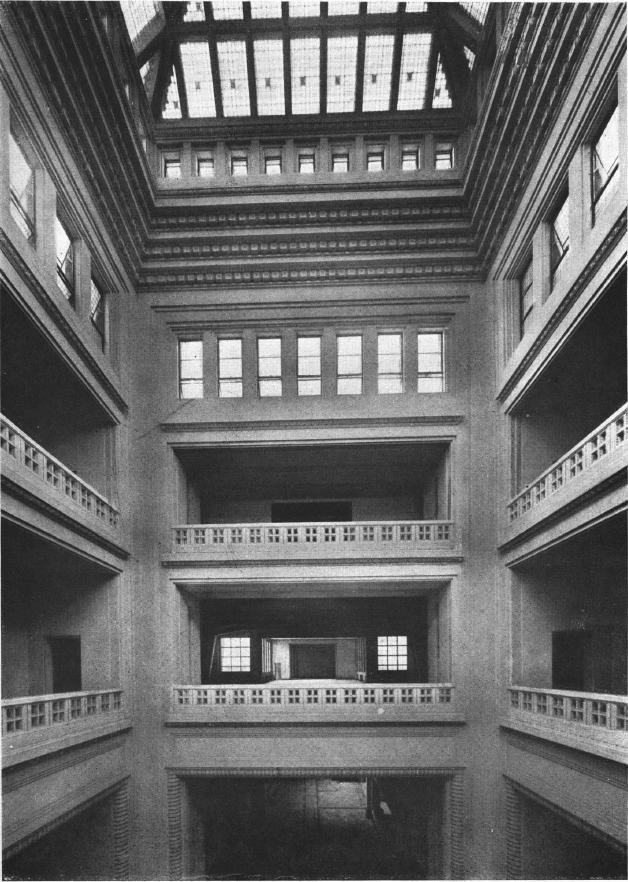 Gran hall central con galerías de la casa matriz del Banco El Hogar Argentino, una de las primeras obras de importancia del arquitecto Alejandro Virasoro en estilo Art Decó. Hoy es un edificio anexo de la casa central del Banco Santander Río. Bartolomé Mitre 575. Buenos Aires, Argentina.